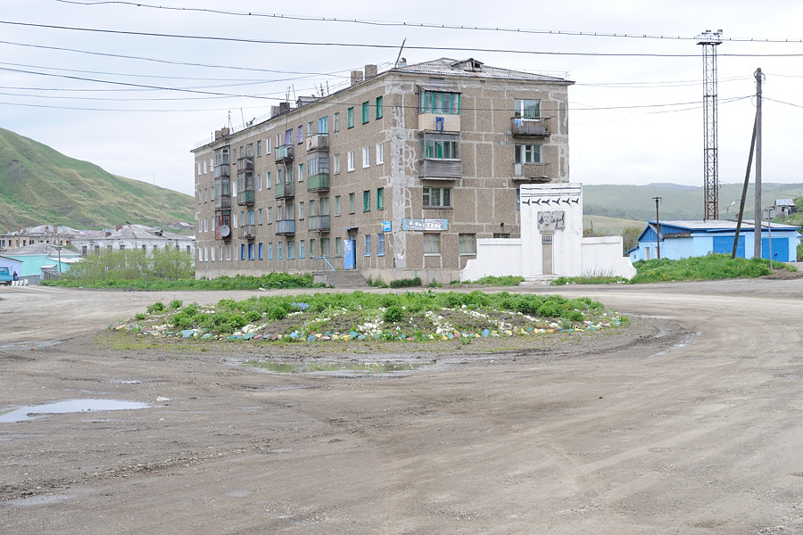 Bahnhofsvorplatz in Tschechow (Sachalin) mit Tschechow-Denkmal